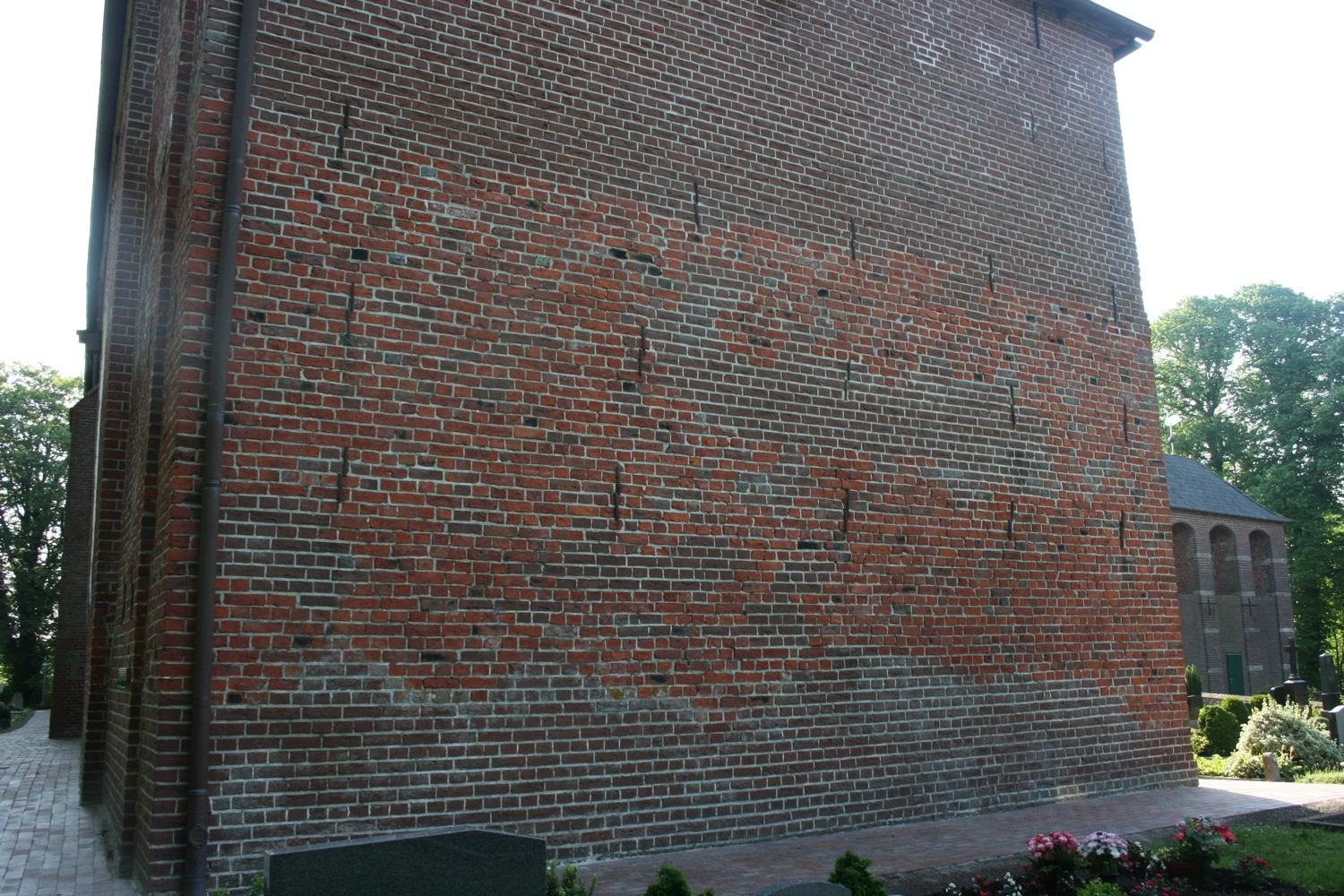 Kreisbahn Aurich Überbleibsel des alten Kirchturms der Kirche Victorbur